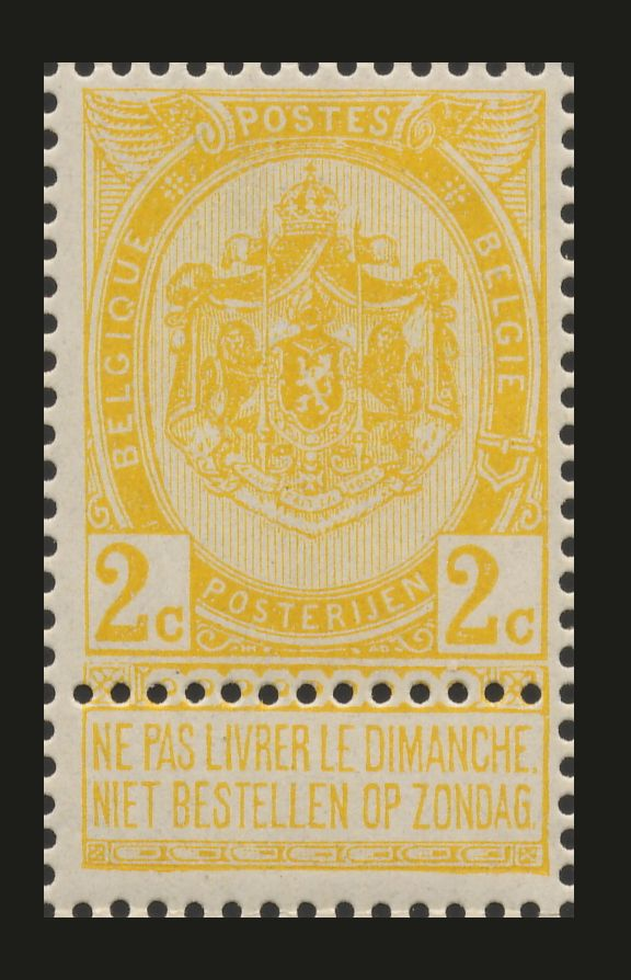 Timbre belge émis entre 1893 et 1900 dont l'auteur Louis-Eugène Mouchon est mort en 1914, et n'a plus cours depuis 1915.